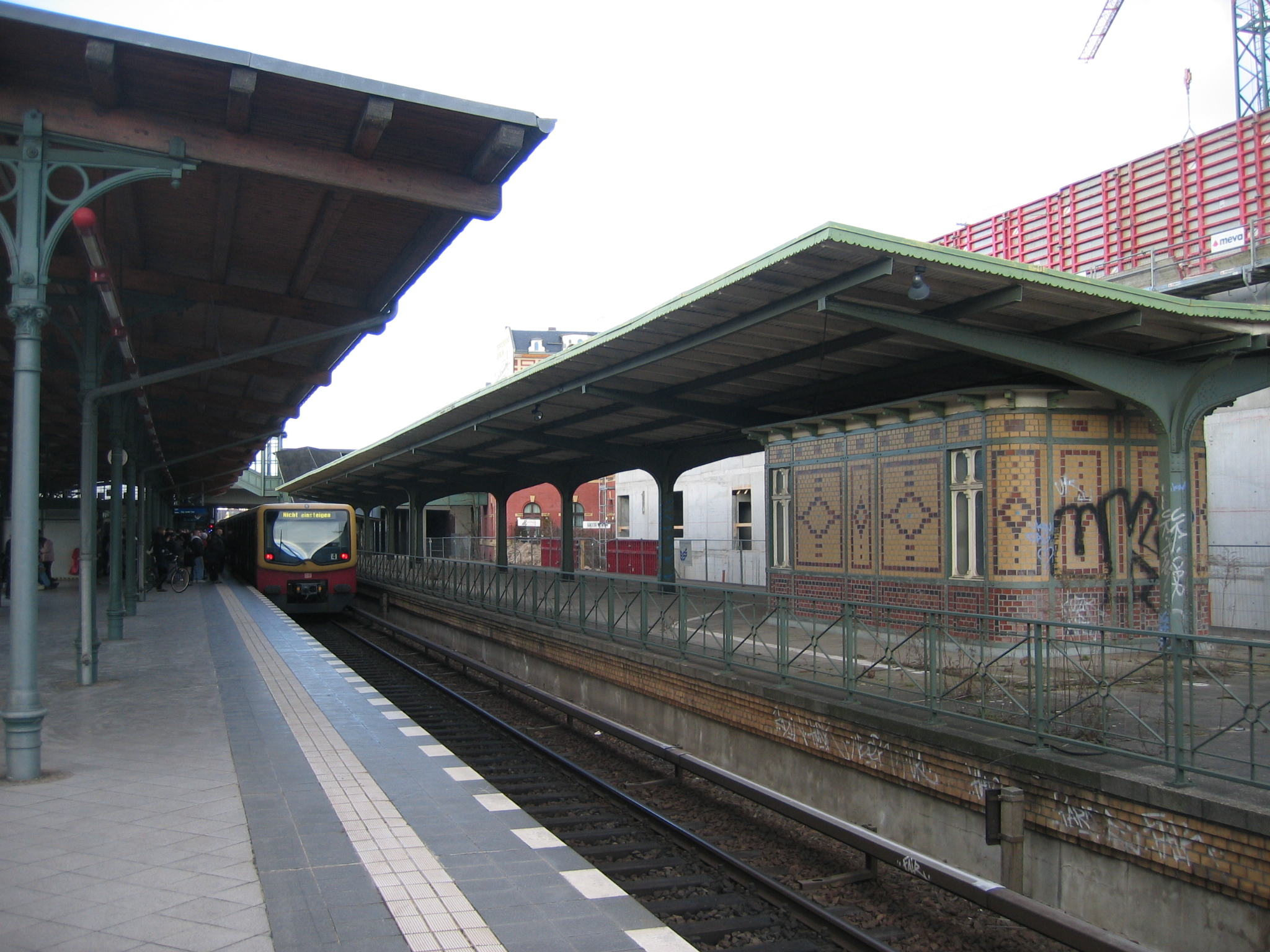 S-Bahnhof Berlin-Westend